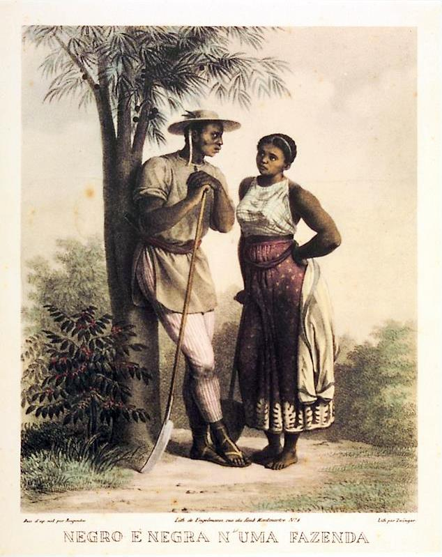 Negro e Negra n'uma Fazenda (litogravura s/ papel, 38,5 x 33 cm)